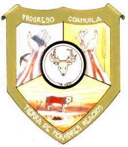 Escudo de armas del Municipio de Progreso, Coahuila